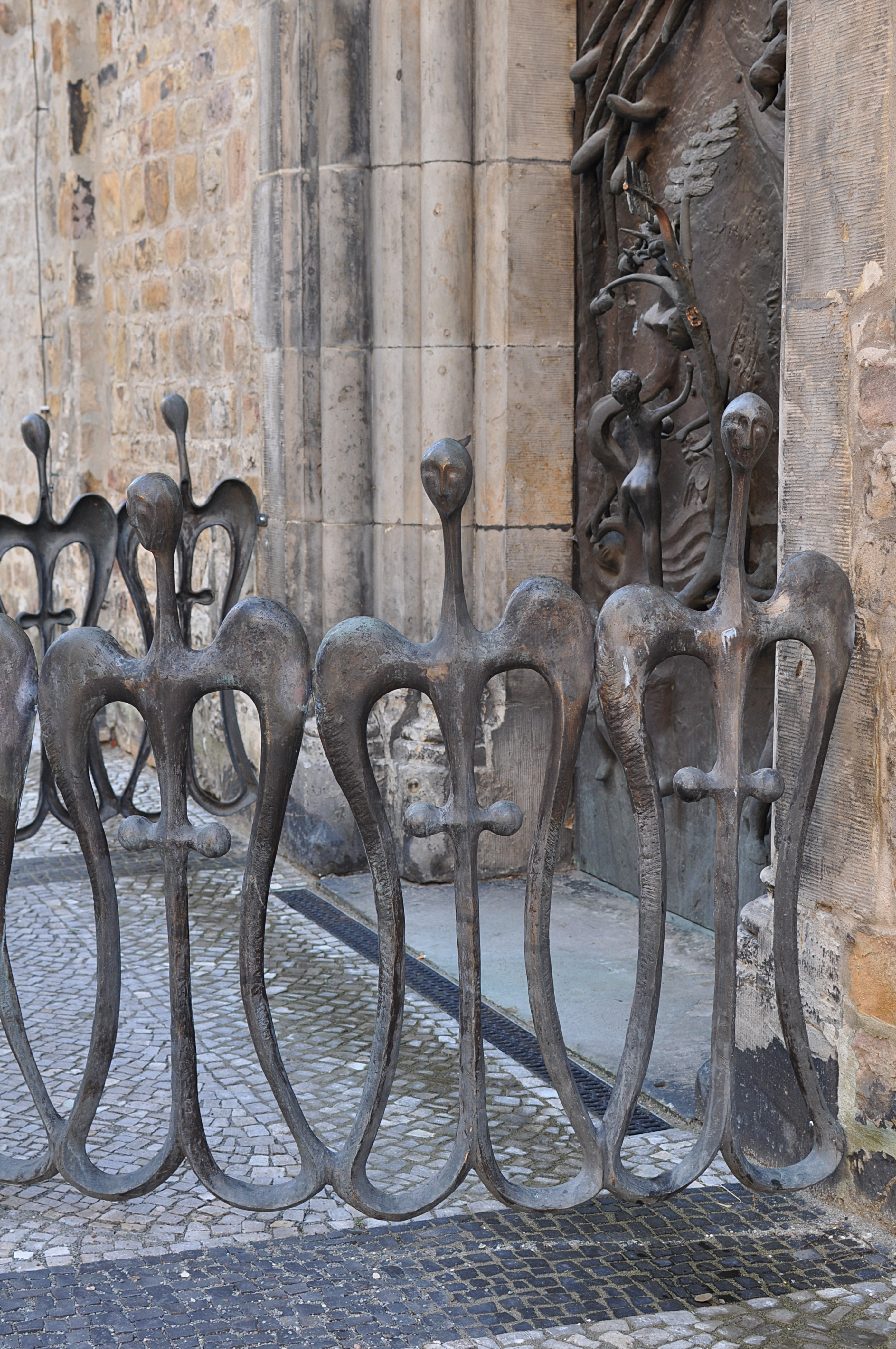 Portalzaun der Kathedrale St. Sebastian in Magdeburg-Altstadt. This is a photograph of an architectural monument.It is on the list of cultural monuments of Magdeburg